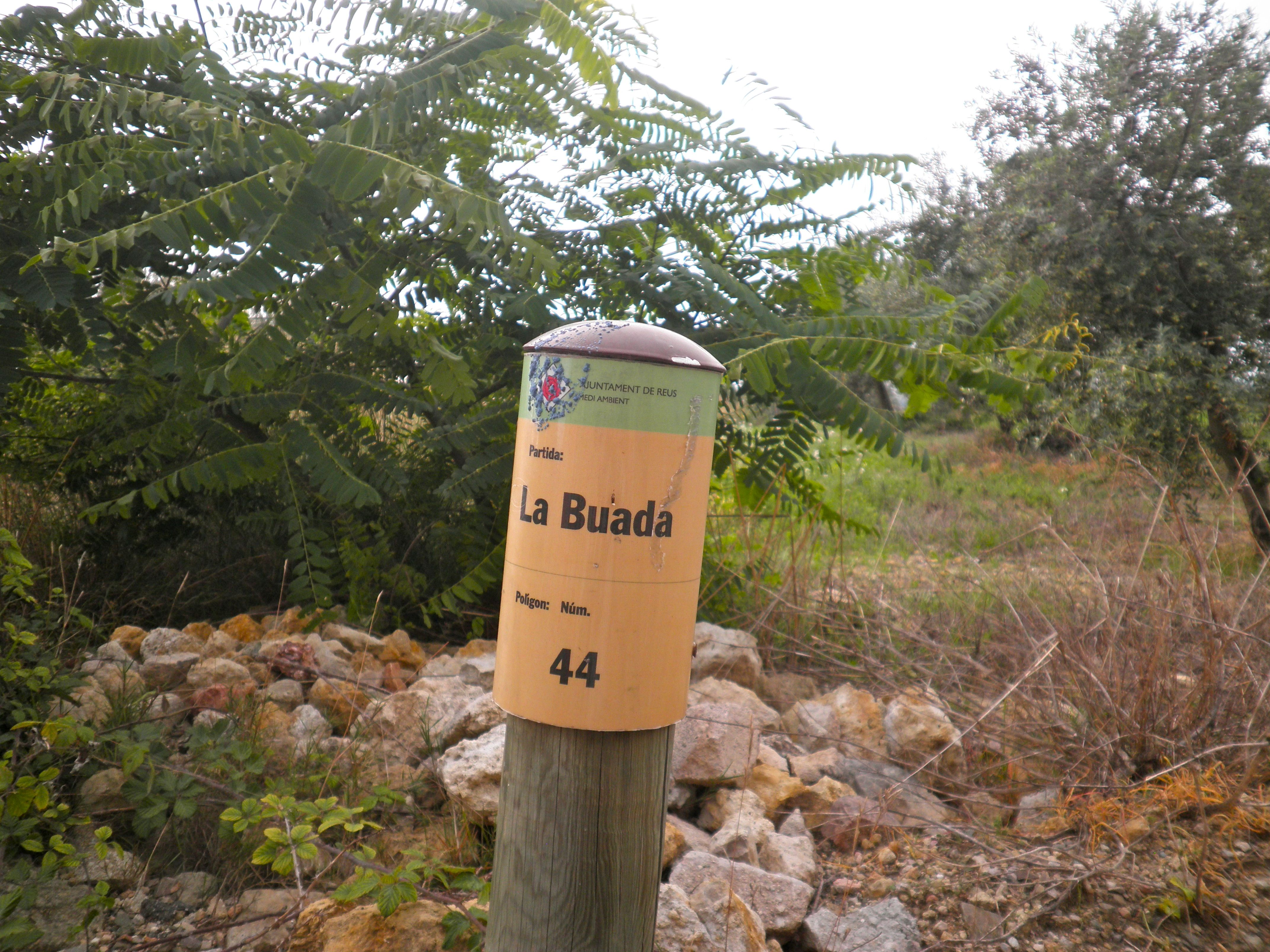 Fita que marca una parcel·la de la partida de la Buada